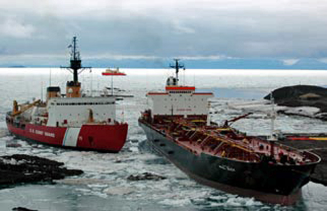 Tanker Paul Buck, USCG Polar Sea, RV Nathaniel Palmer